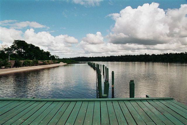 Surinamerivier stroomafwaarts